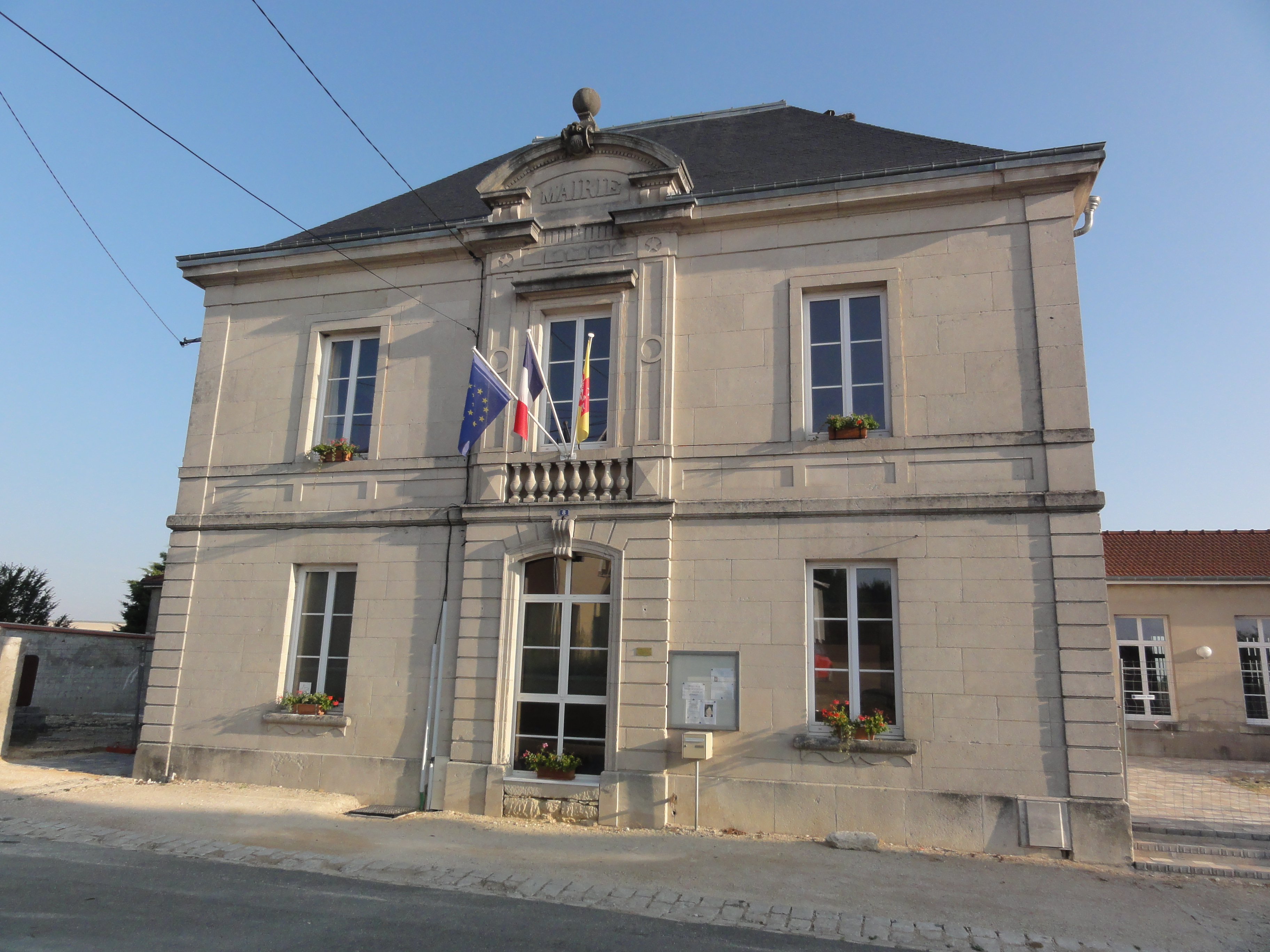 Ancemont (Meuse) mairie